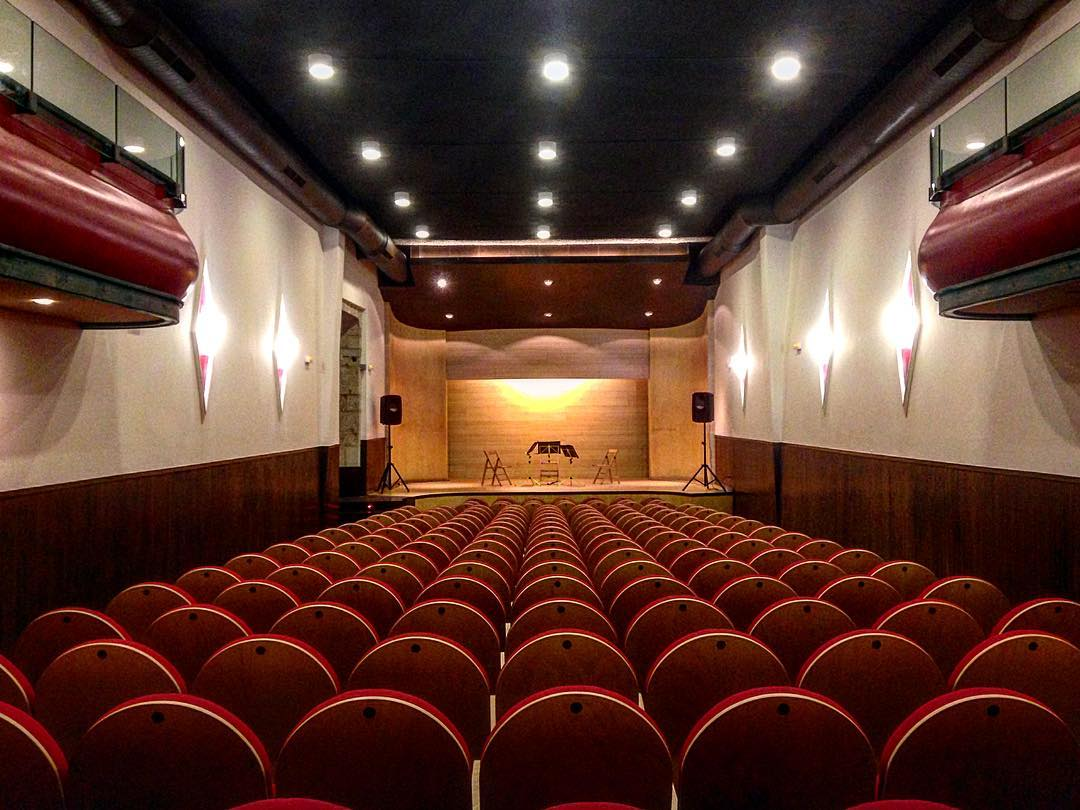 Interior do Teatro Alfonsetti de Betanzos. Vista dende o público.